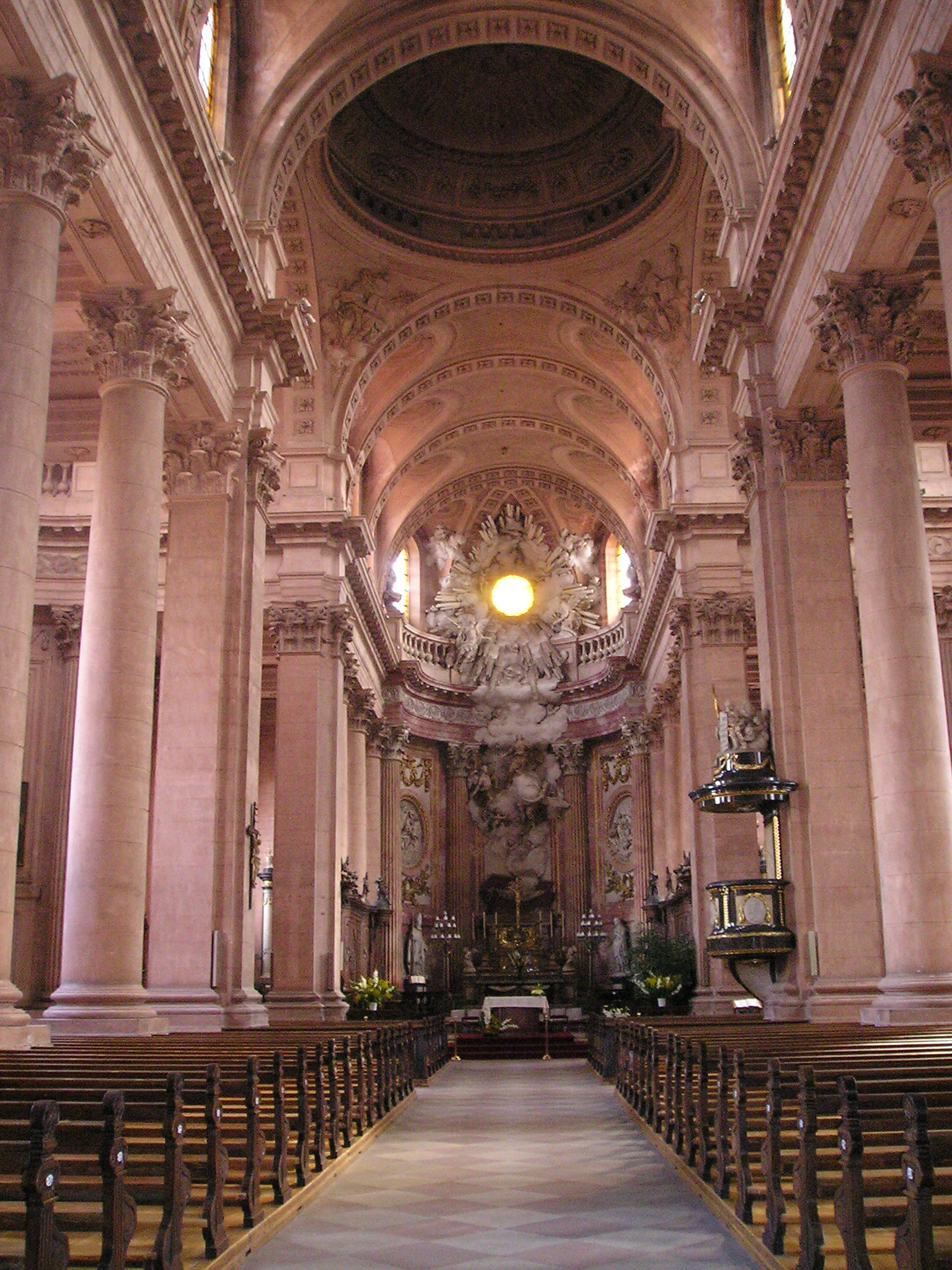 Guebwiller, Notre-Dame, Inneres